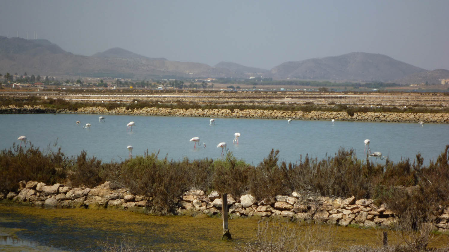 Flamencos rosados (phoenicopterus roseus) en las salinas de Marchamalo en el Mar Menor en Cartagena (Spain).